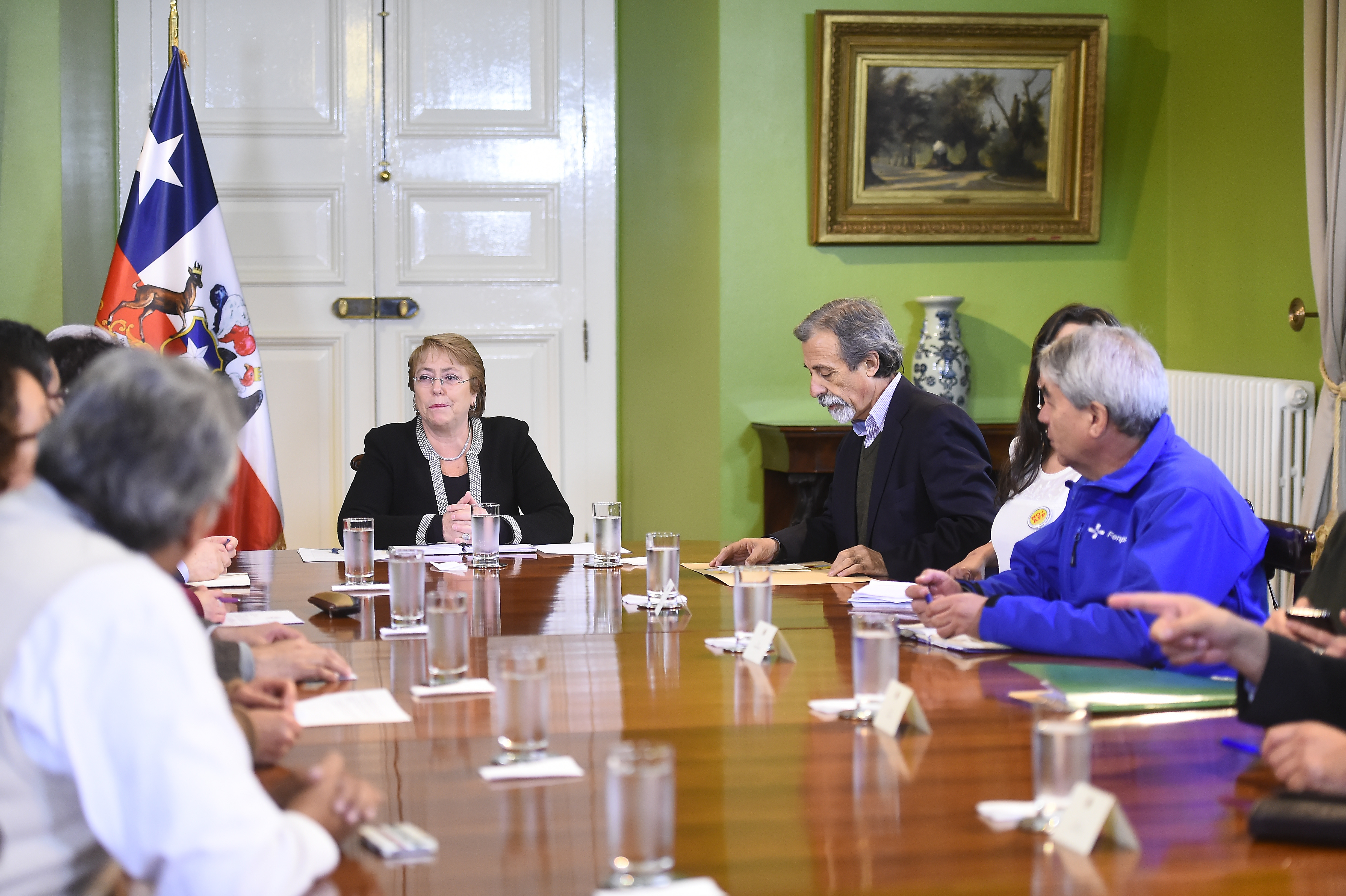 Gobierno de Chile